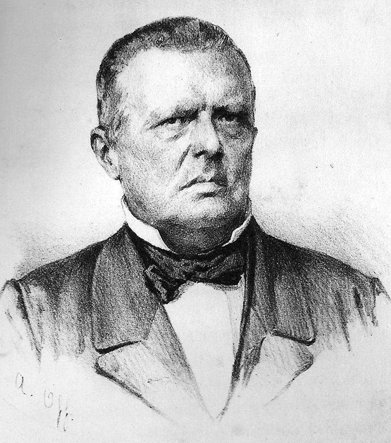 Antônio Francisco de Paula Holanda Cavalcanti de Albuquerque, Ministro do Império no período regencial, Visconde de Albuquerque.